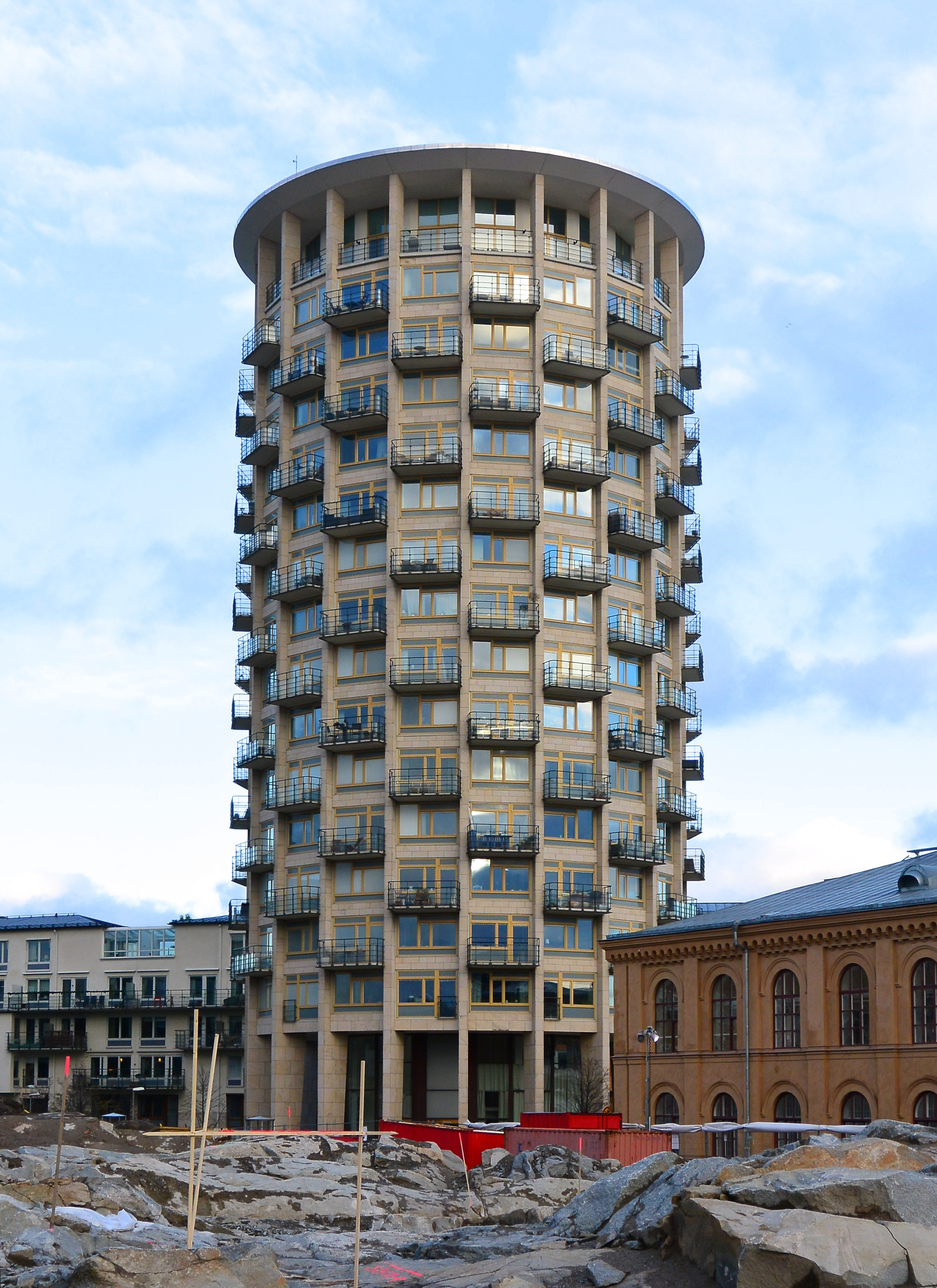 Svea torn på Gärdet i Stockholm.